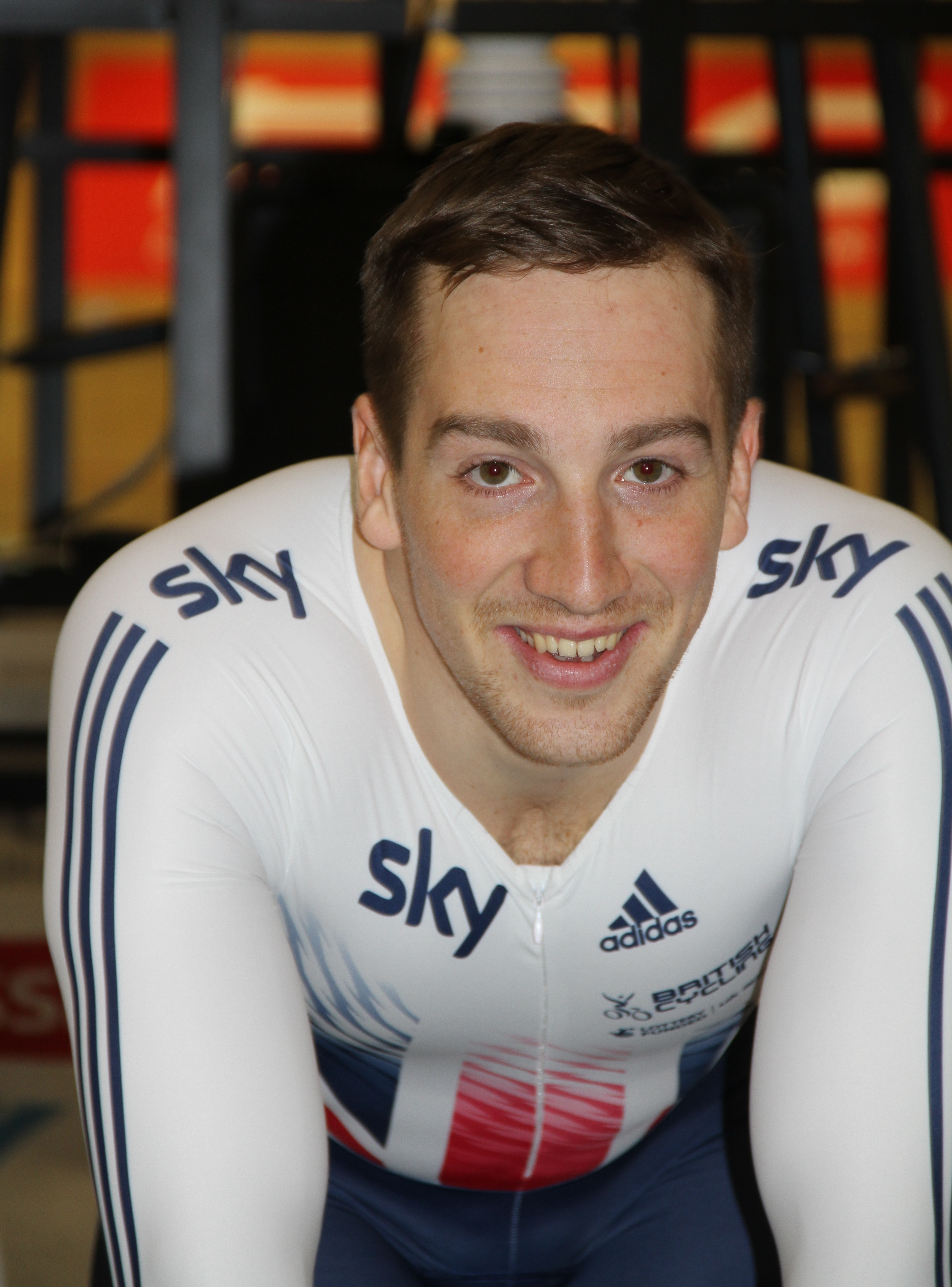 Lewis Oliva, britischer Radsportler The making of this document was supported by the Community-Budget of Wikimedia Germany.